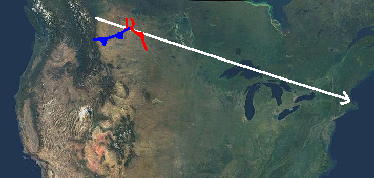 Trajectoire des dépressions de types Clippers albertains- Alberta Clippers lows trajectories.